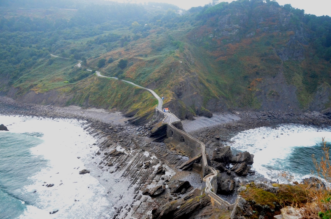 Вид с часовни на рукотворный мост и лестницу